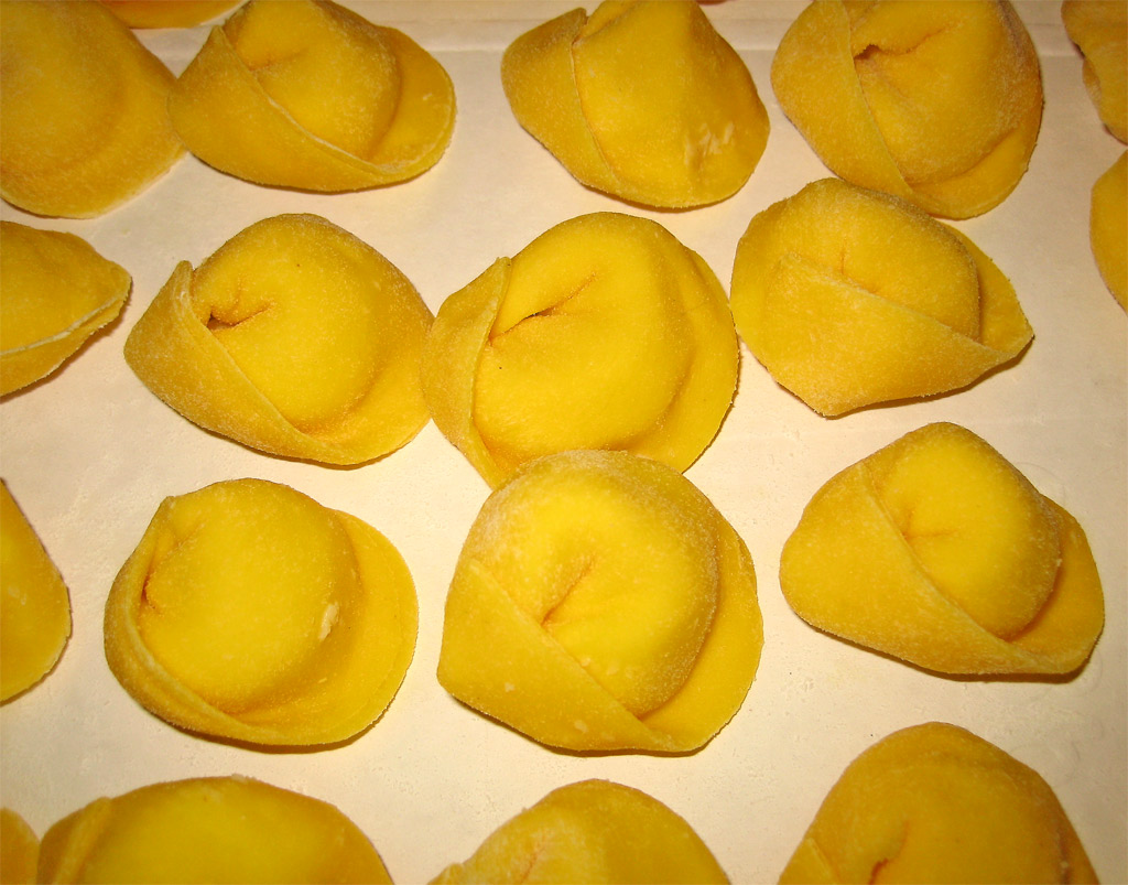 cappelletti romagnoli (da brod) sfoglia di farina 00 spadoni speciale per pasta fatta in casa e uova di gallina livornese allevate a terra ripieno: ricotta, parmigiano, noce moscata uova